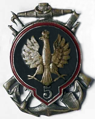 Odznaka 5 batalionu saperów